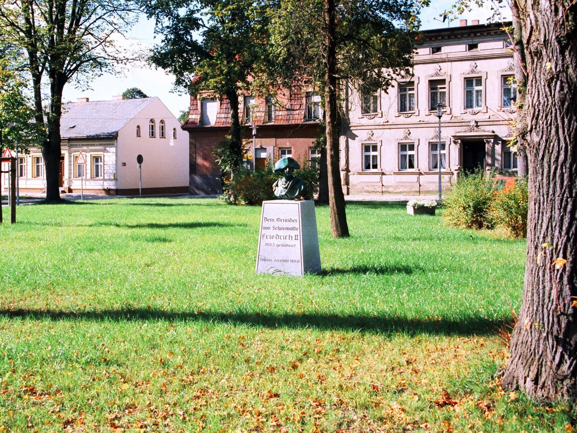 Denkmal Friedrich II. (Original), Schönwalde (Barnim), Amt Wandlitz, Land Brandenburg (Deutschland)